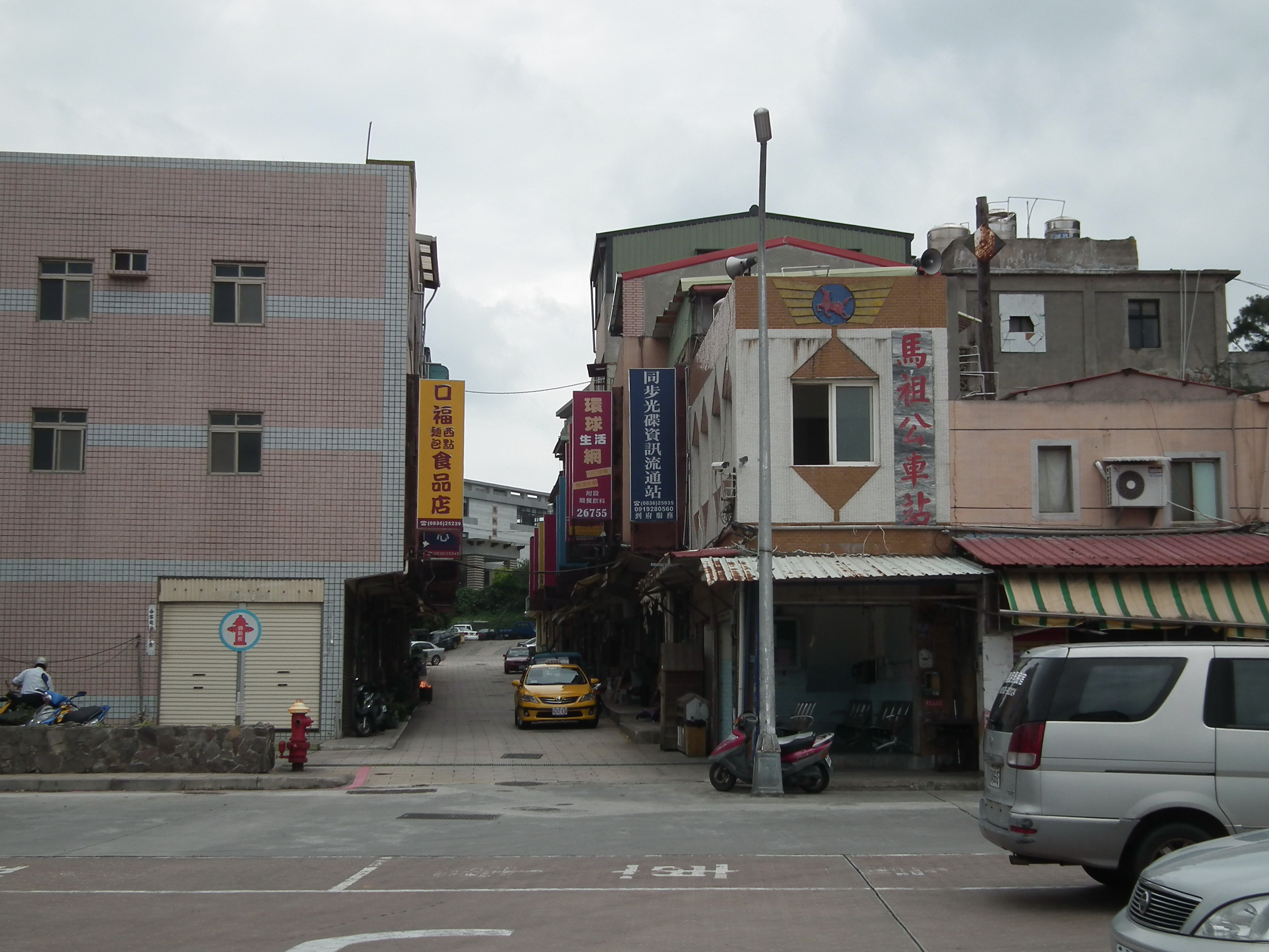 Nangan Magang Bus Station 南竿馬港公車站